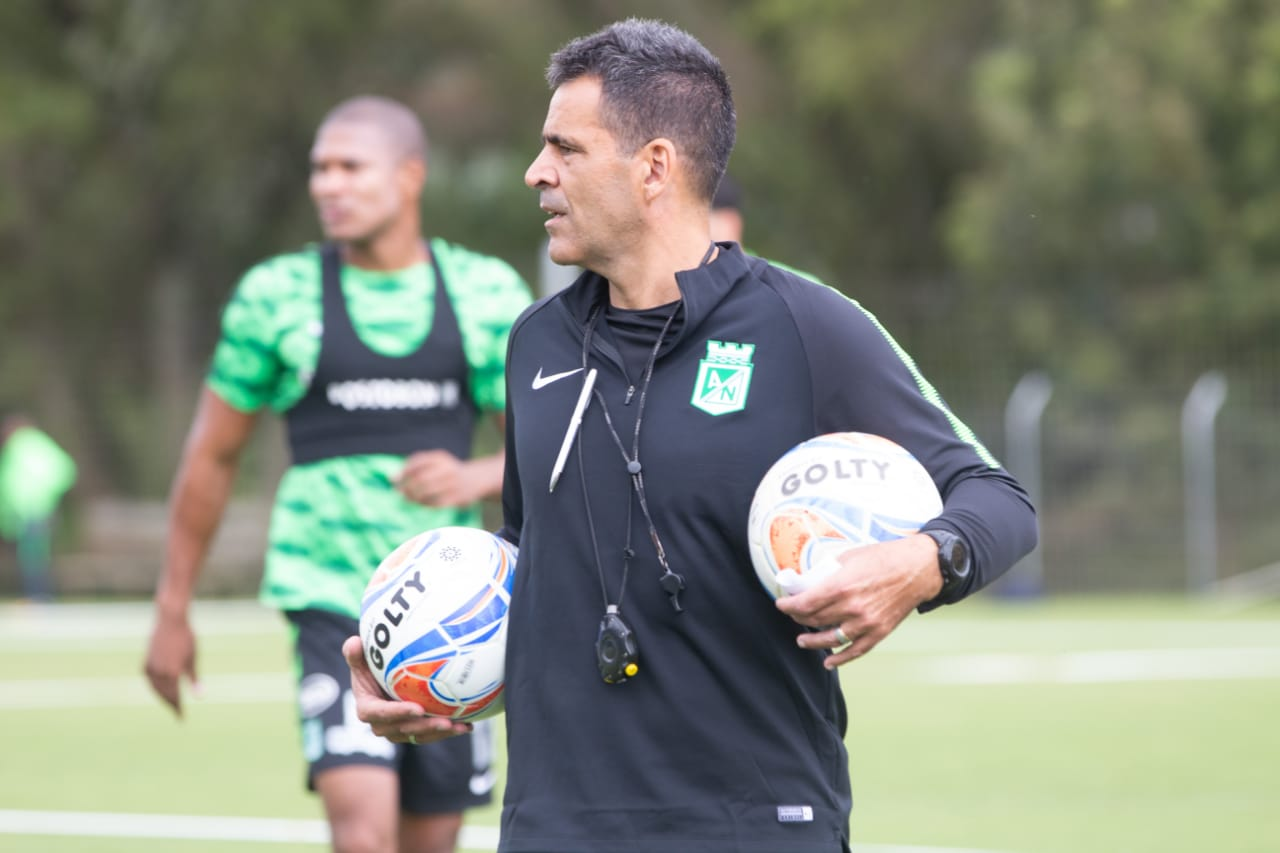 Atlético Nacional - 2018